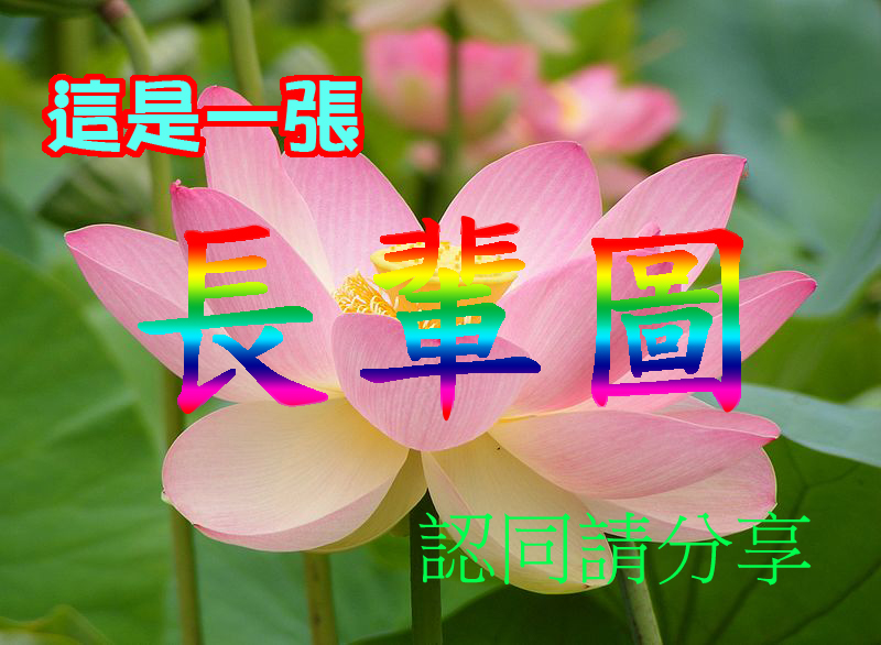 這是一個用以說明「長輩圖」的範例圖片